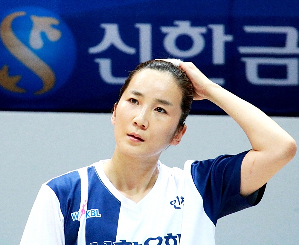 160210 여자농구 신한은행 vs 하나외환 직찍 1